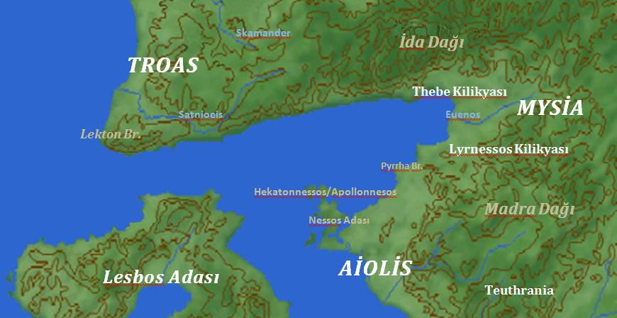 antik dönem edremit körfezi, önemli bölge ve coğrafi yer adları